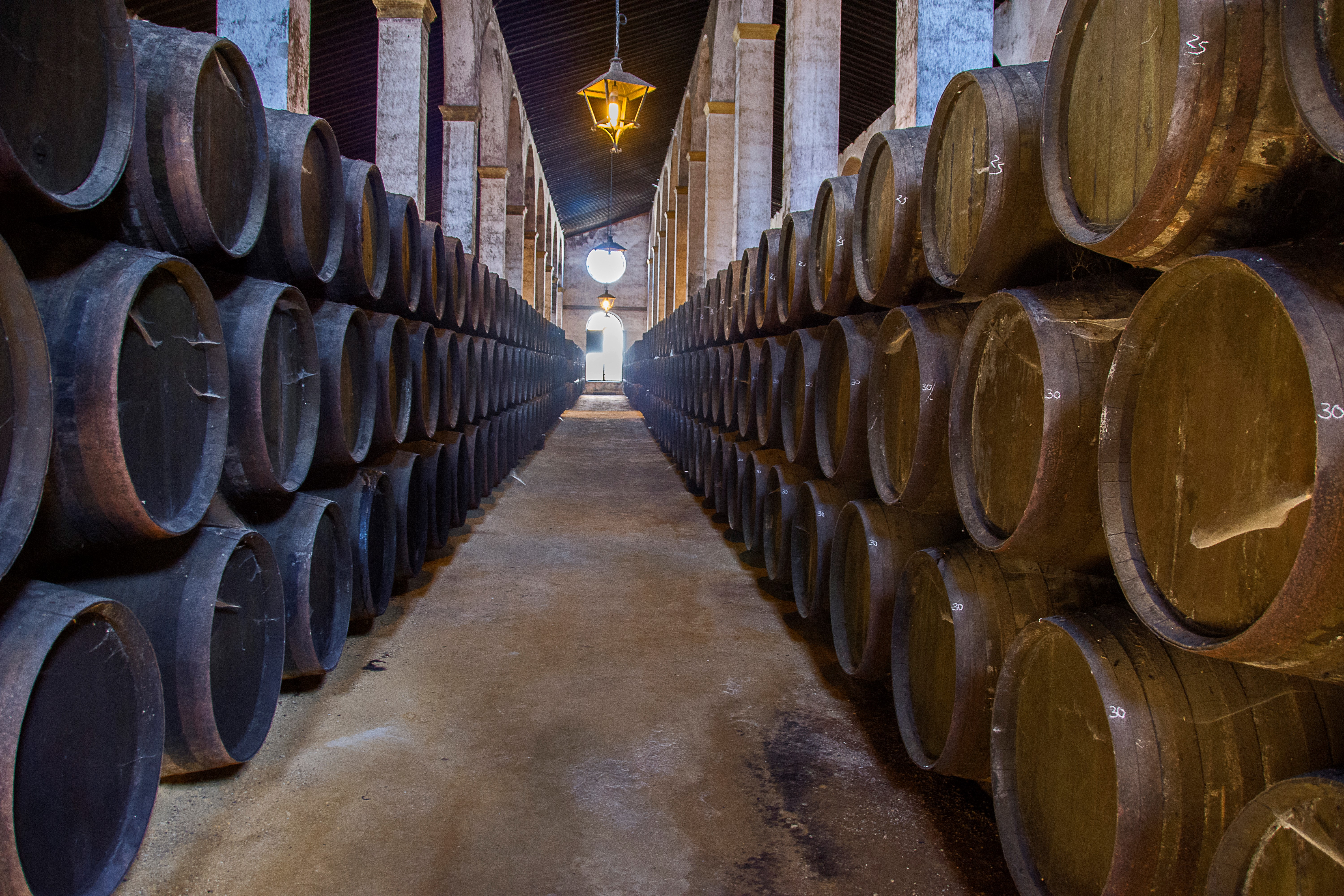 Interior de las bodegas Lustau en Jerez de la Frontera